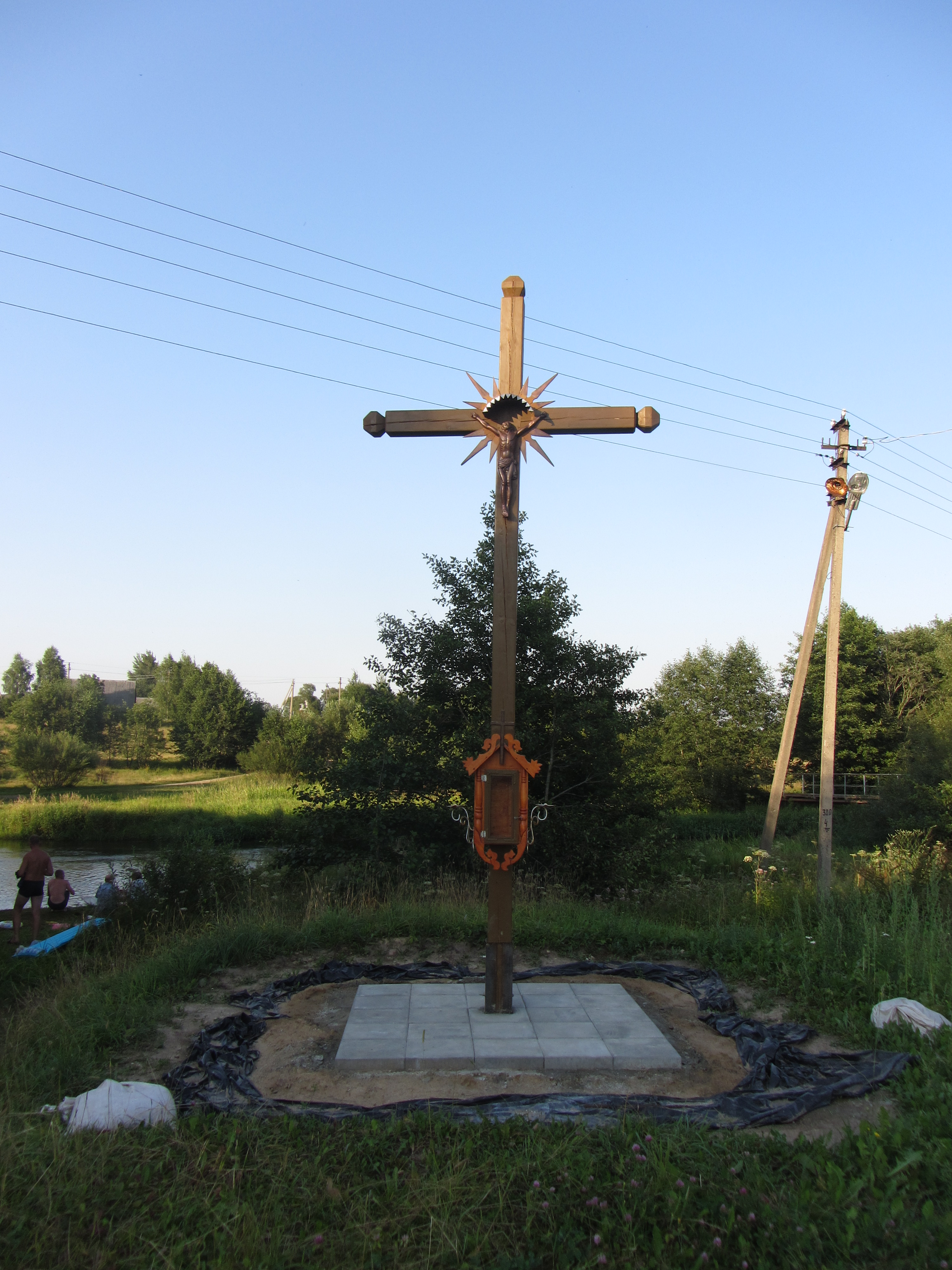 Valakininkai, Lithuania